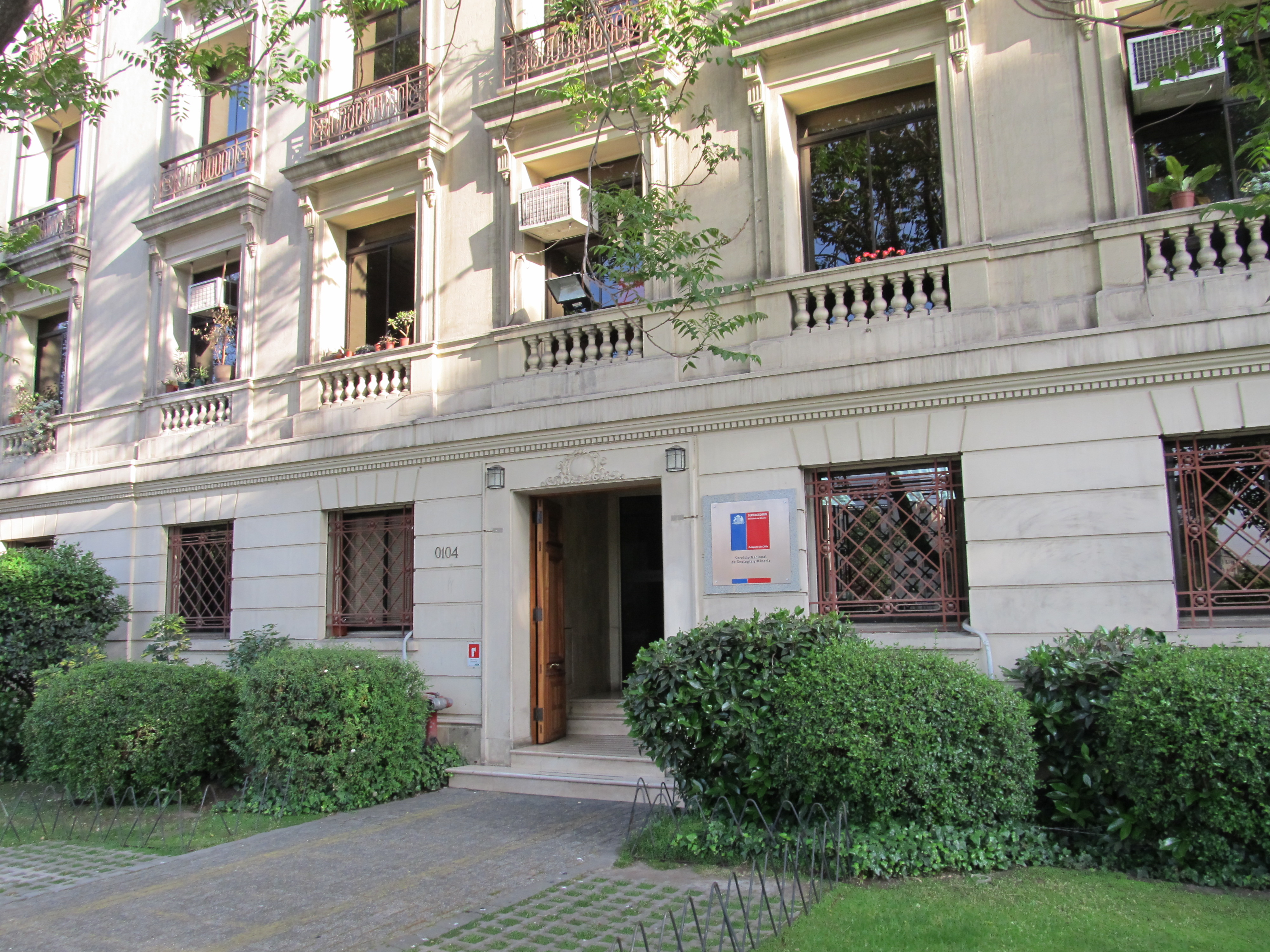 Edificio del Servicio Nacional de Geología y Minería de Chile (SERNAGEOMIN) en Santiago de Chile.